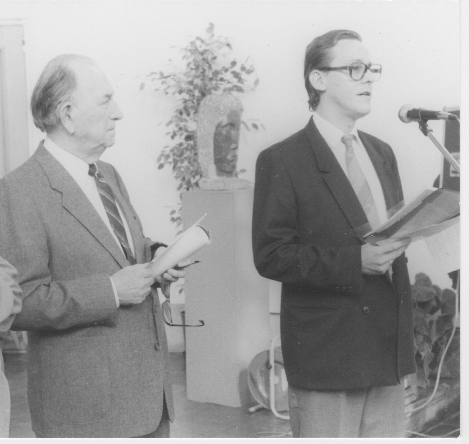 Rechts Rudy Van Quaquebeke schepen voor Cultuur te Gent en links de voormalige schepen van cultuur Alfons van Nimmen. Ik ondergetekende verklaar mij akkoord met de voorwaarden van Wikipedia. Ik heb de foto zelf genomen bij gelegenheid van een tentoonstelling te Sint-Amandsberg in 1990. Beide personen zijn overleden. Beleefd verzoek deze foto te plaatsen bij het lemma van Rudy Van Quaquebeke. Waarvoor dank.